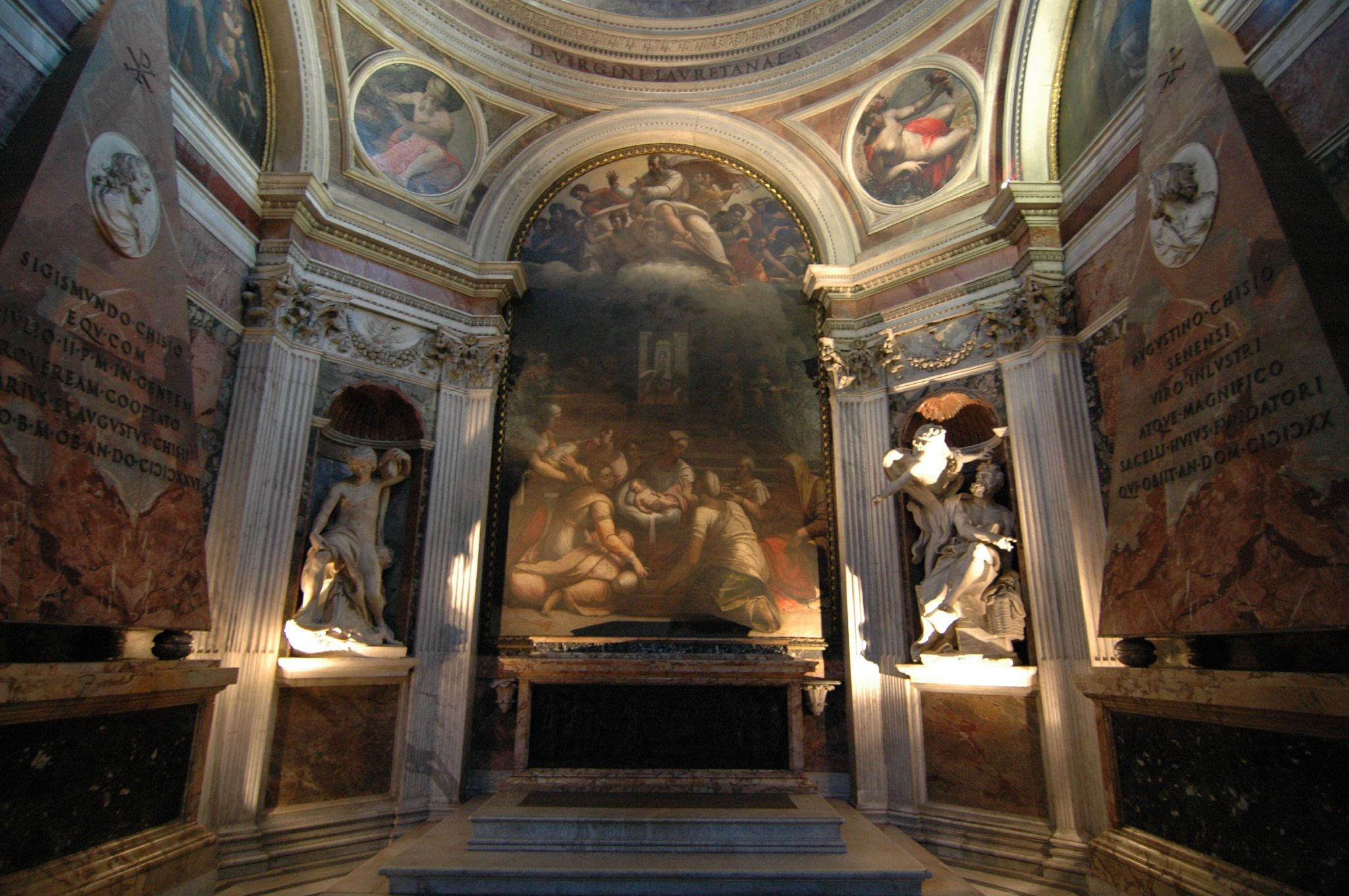 Santa Maria del Popolo (Rome)